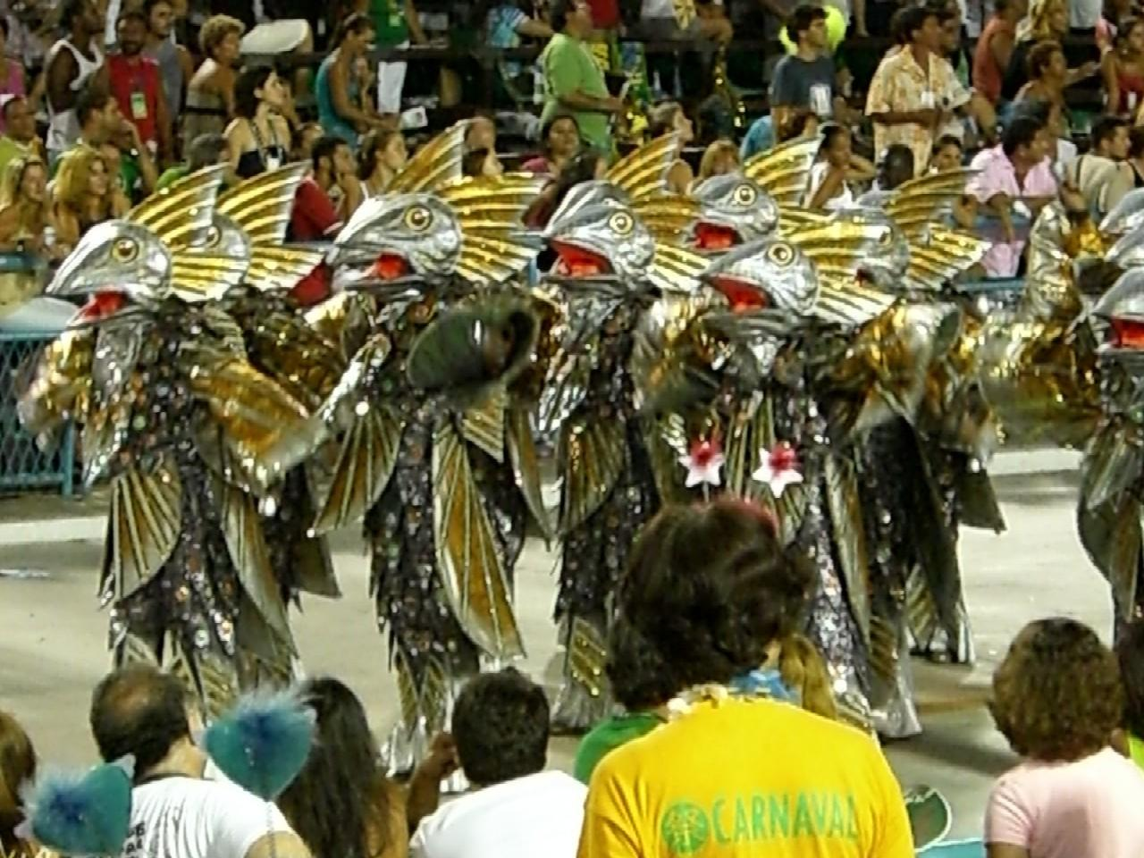 Desfile do GRES Imperatriz Leopoldinense, 2007. Comissão de frente. (samba school Imperatriz Leopoldinense, front comission)